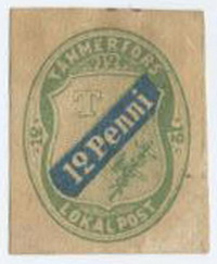 Почтовая марка локальной почты Тампере, 1866